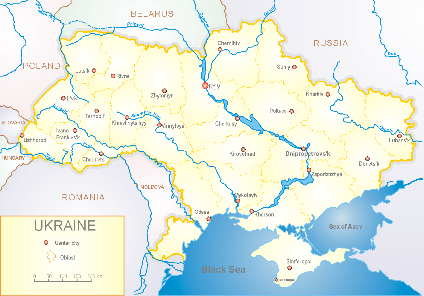 Ukraine map Map by Sven Teschke